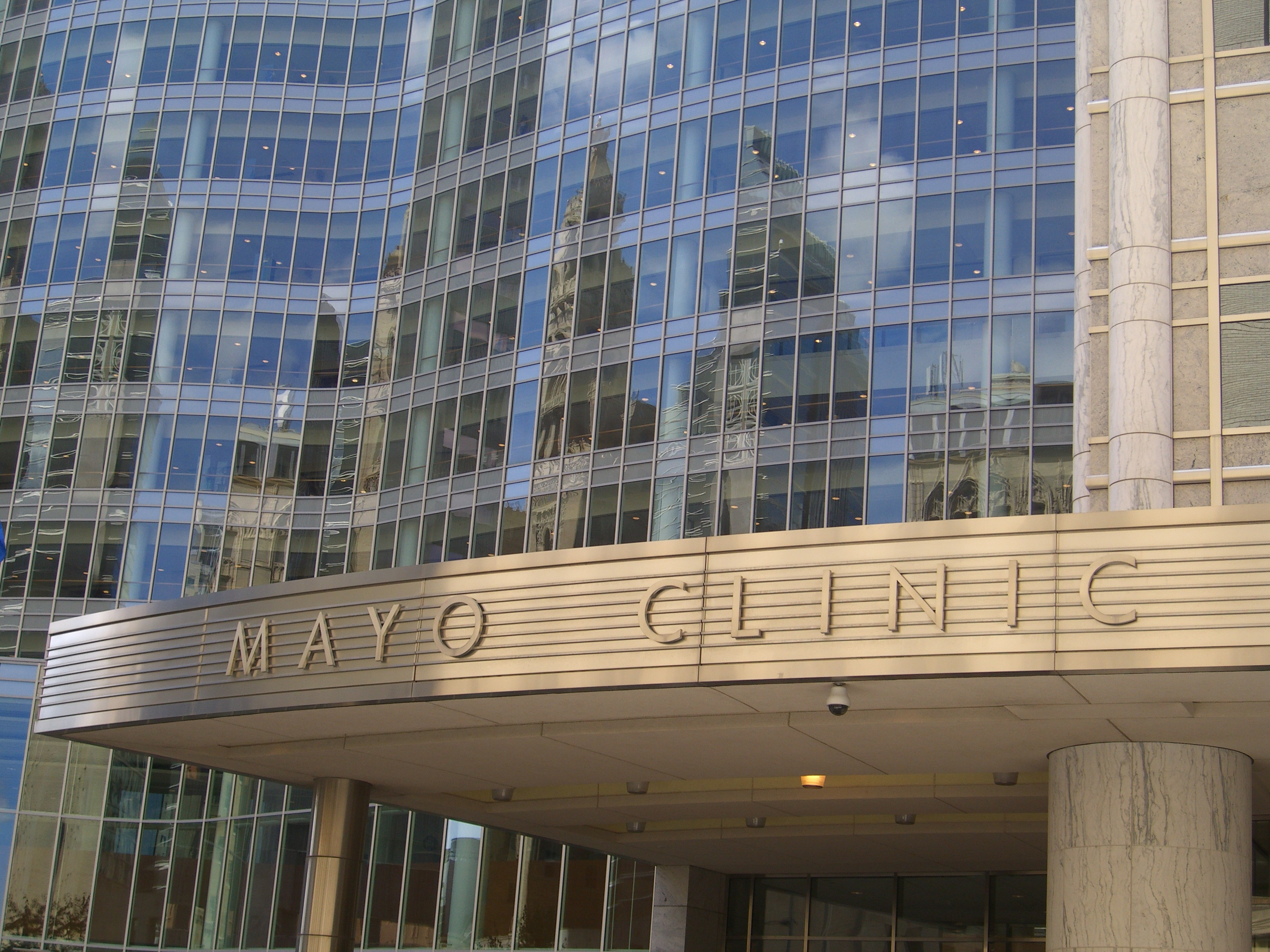 Die berühmte Mayo Klinik in Rochester / USA